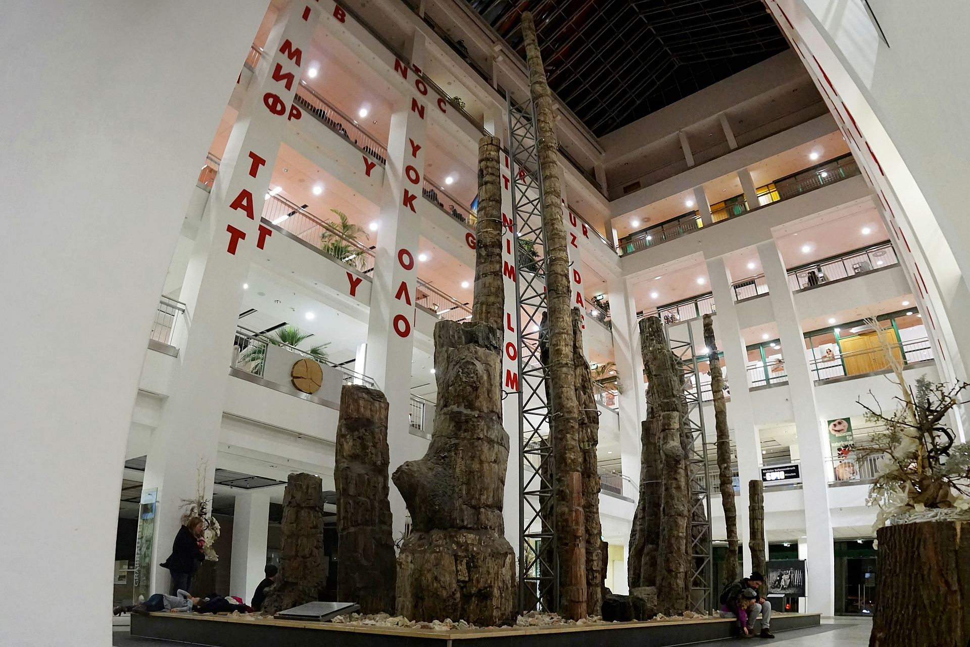 Der Versteinerte Wald von Chemnitz im Lichthof des Kulturkaufhaus DAStietz, 2015